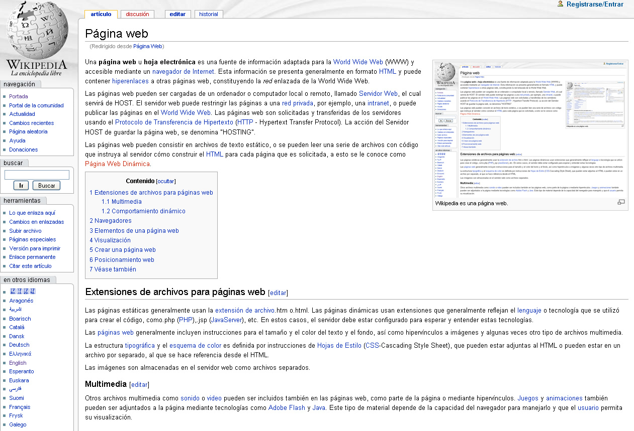 Captura de pantalla del término Página web en Wikipedia.